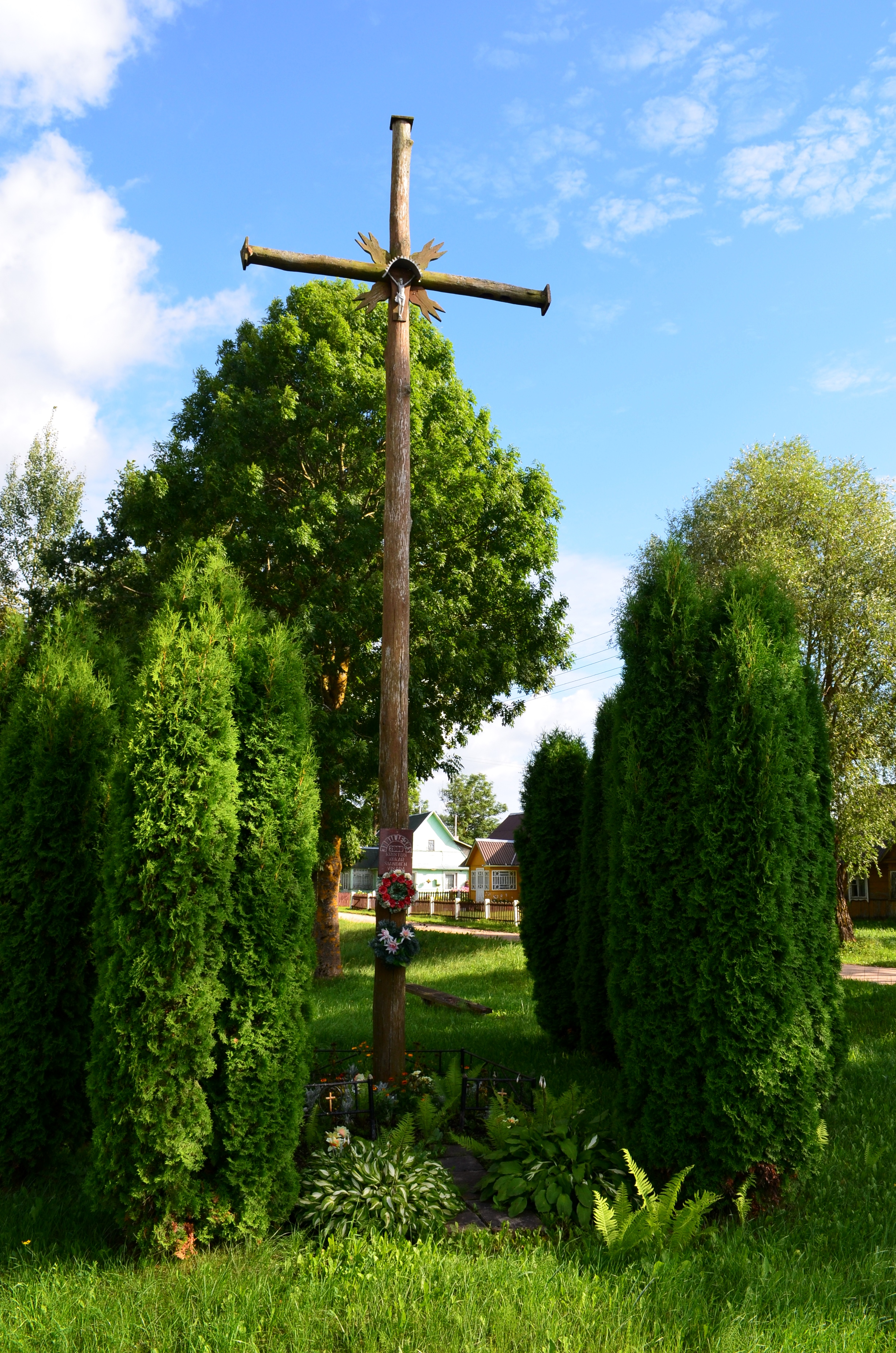 Kackonių k., Svirkų sen., Švenčionių raj.